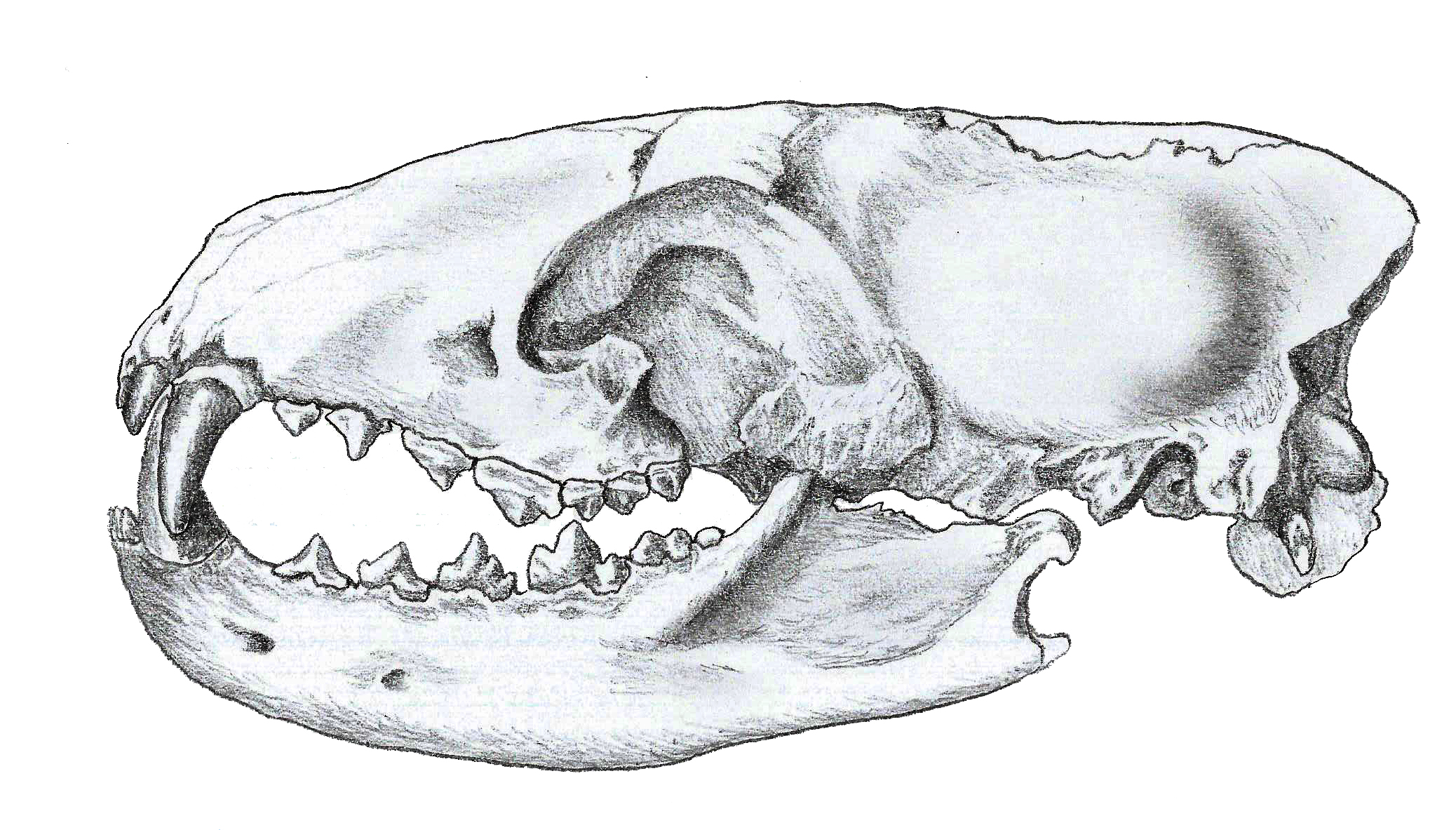 Skull of Temnocyon ferox.